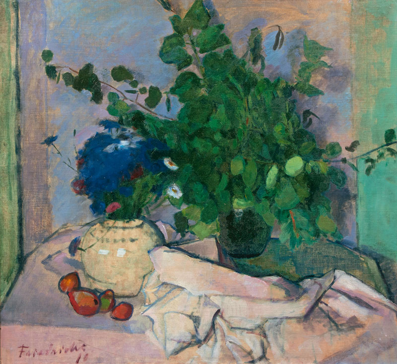 Tafelstilleben mit Vasen und Früchten, Öl/Lw./Hartfaser, 69,5 x 75 cm, l. u. sign. u. dat. Friedrichs 10